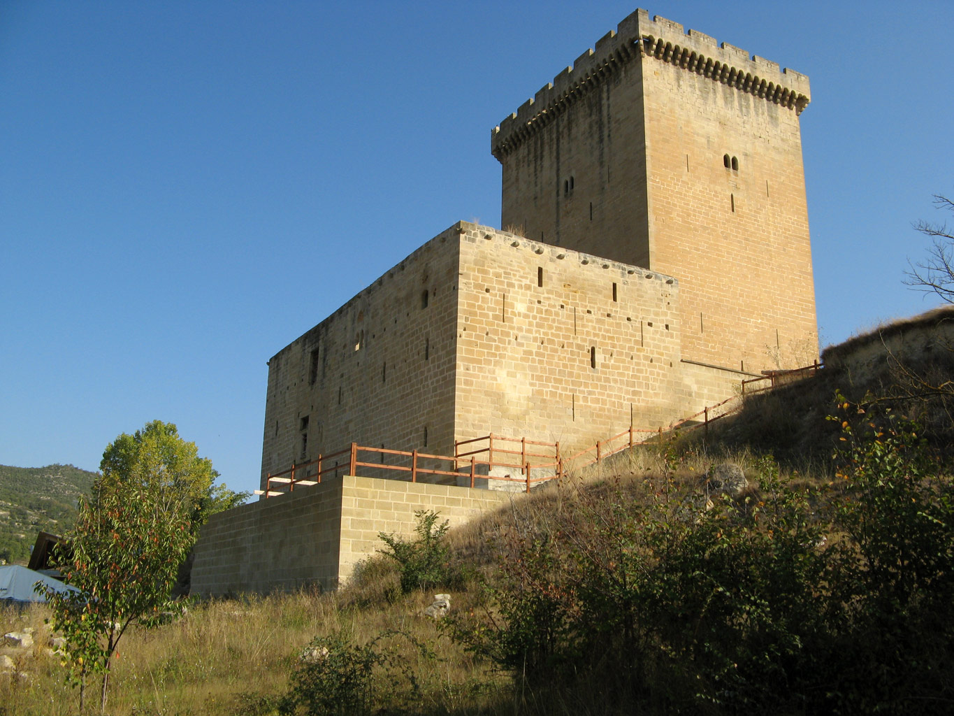 Torre-Palacio del Conde de Orgaz, Fontecha, Lantarón, Alava, País Vasco (BIC=RI-51-0005123).